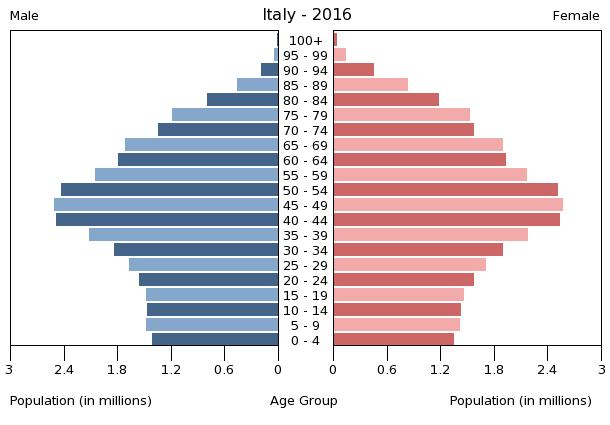 Bevölkerungsstruktur Italiens